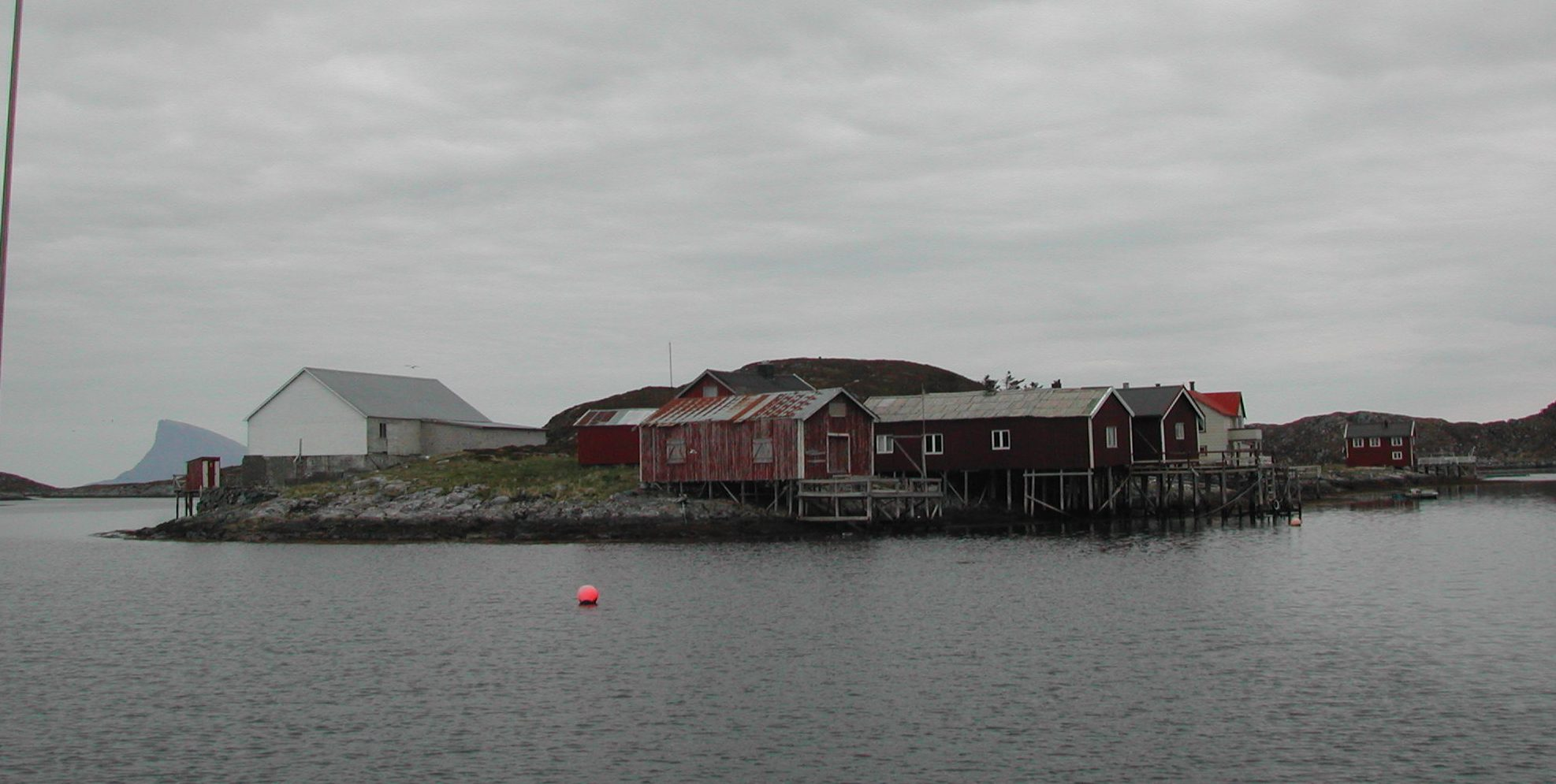 Åsværet in Dønna